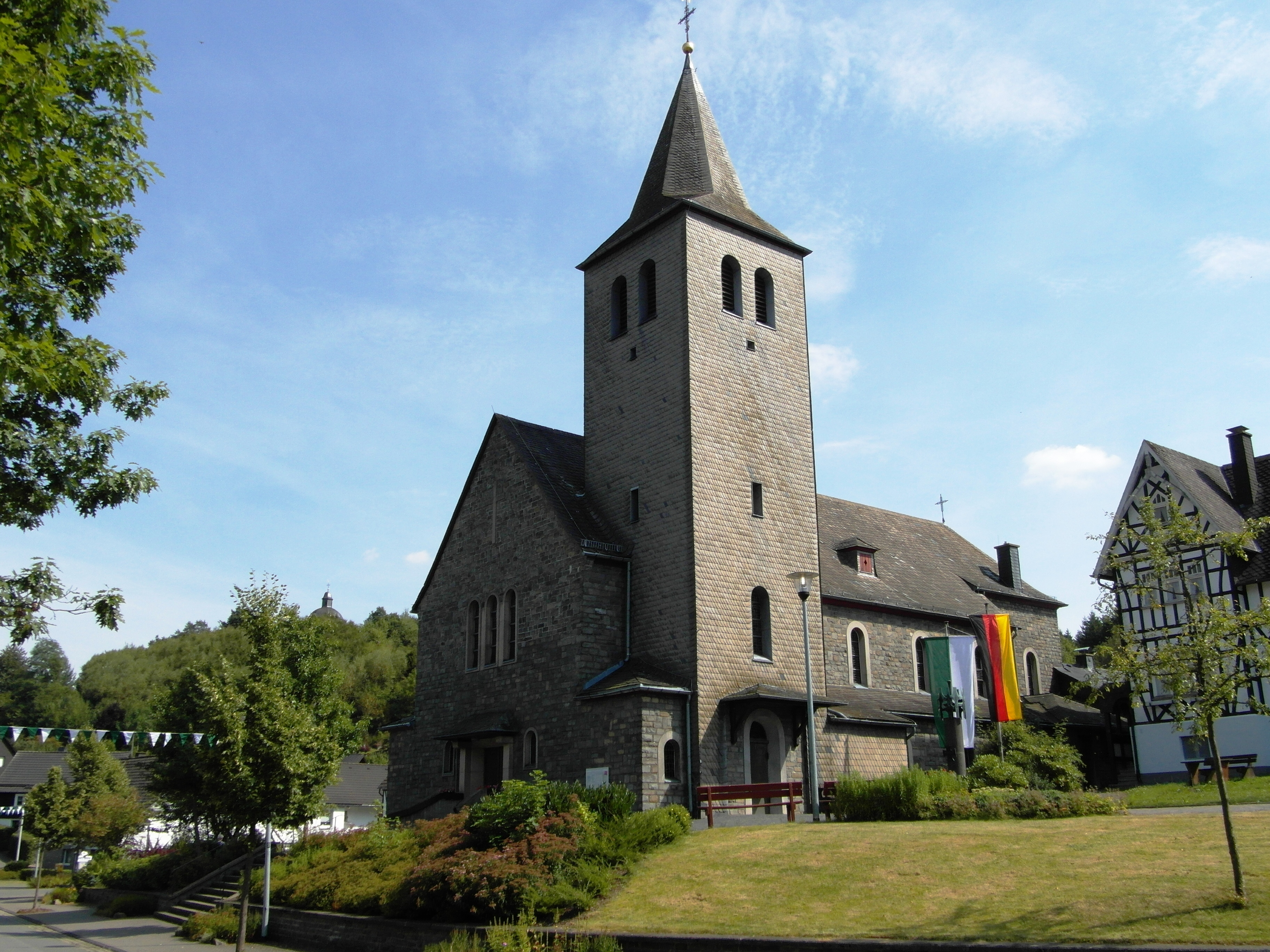 Im Jahr 1949 errichtete Saalkirche in Oberveischede (Olpe)